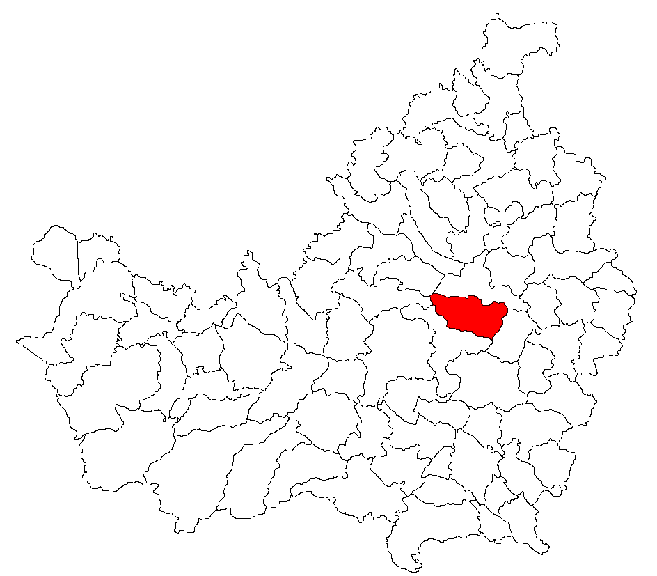 Categorie:Hărţi ale judeţului Cluj